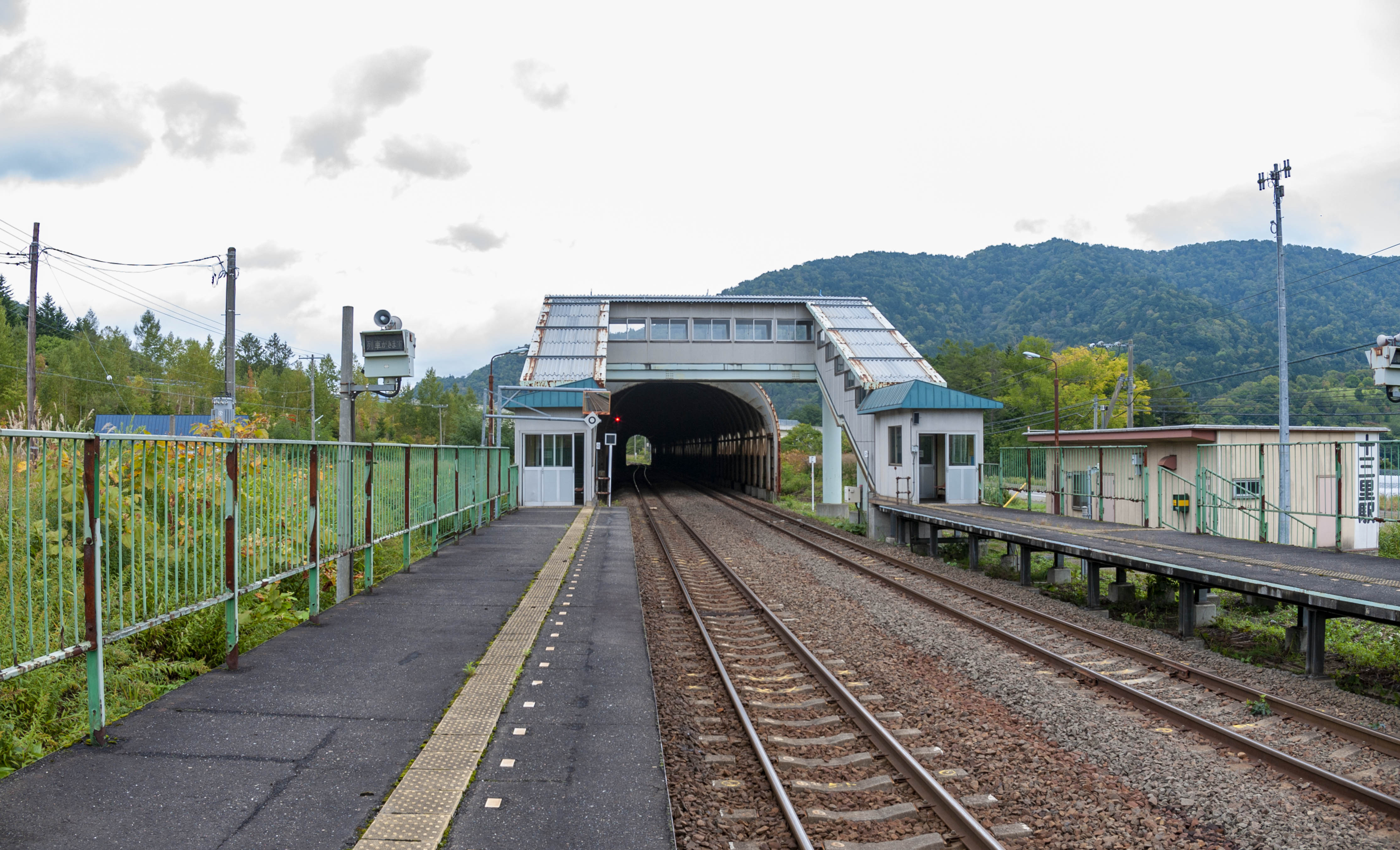 北海道旅客鉄道石勝線十三里駅（現十三里信号場）構内